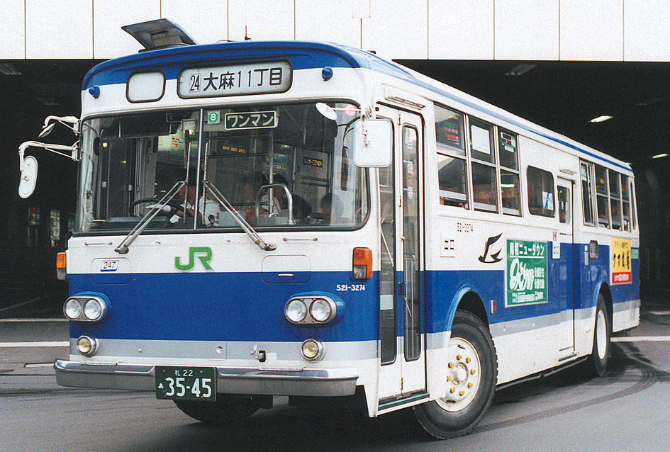 JR北海道バス いすゞ K-CJM550 日野車体